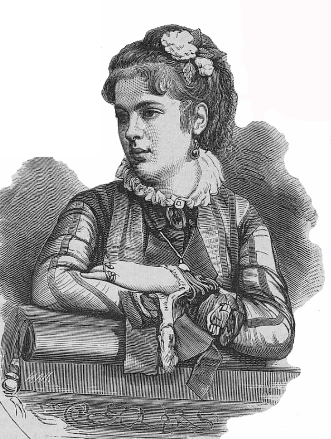 Петипа Мария Мариусовна - русская балерина, 1876 год